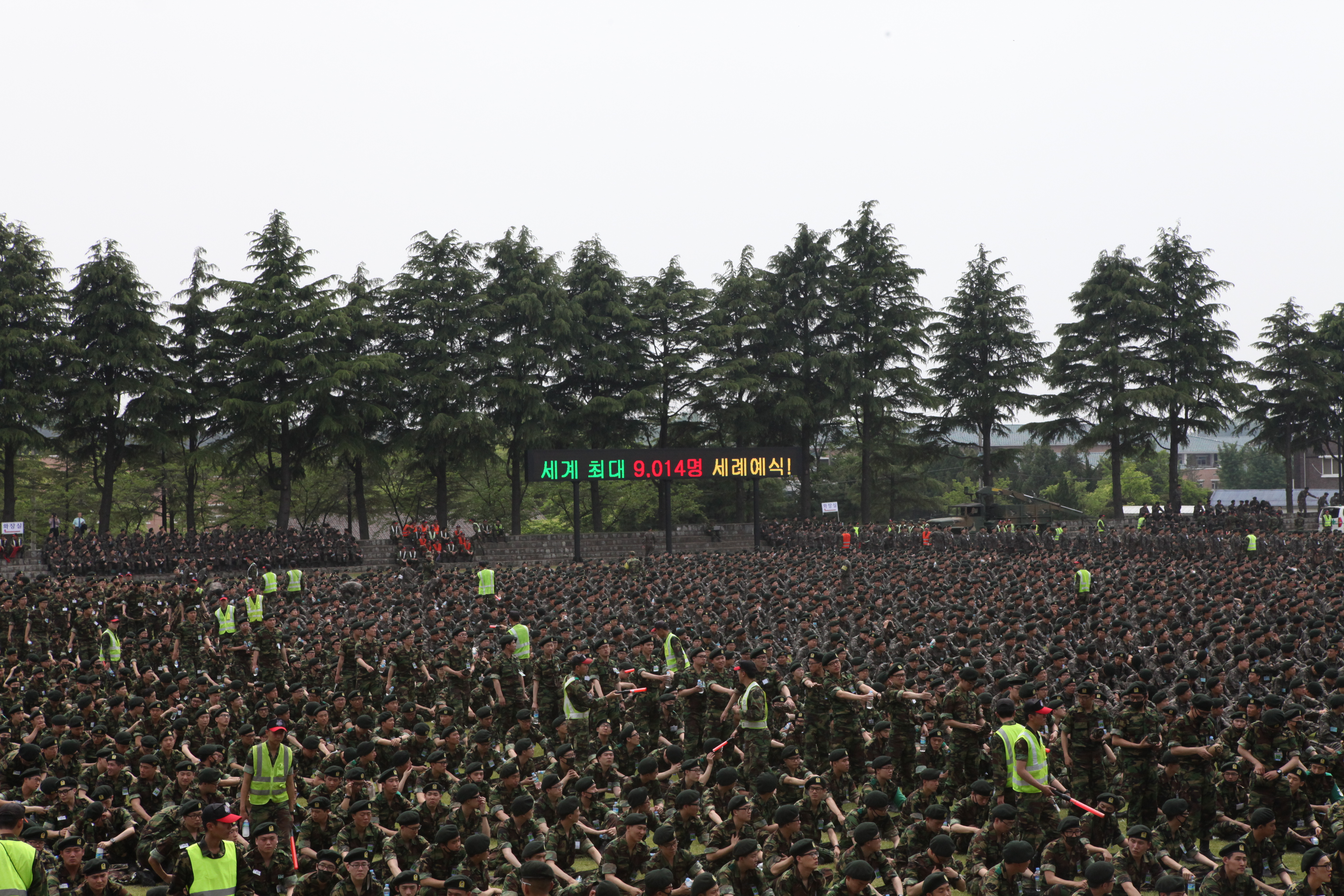 연무대 기네스북 등제 기록적 세례식 전경